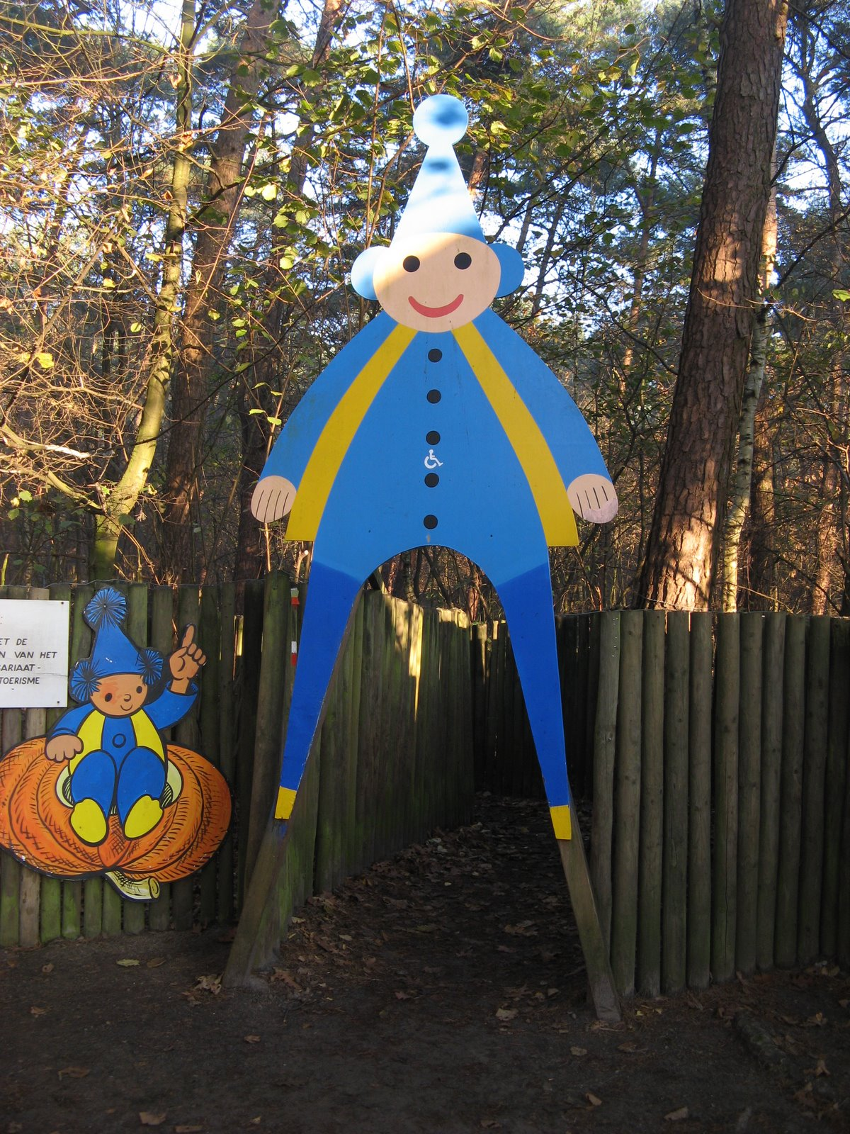 Kabouterberg, kasterlee, belgium